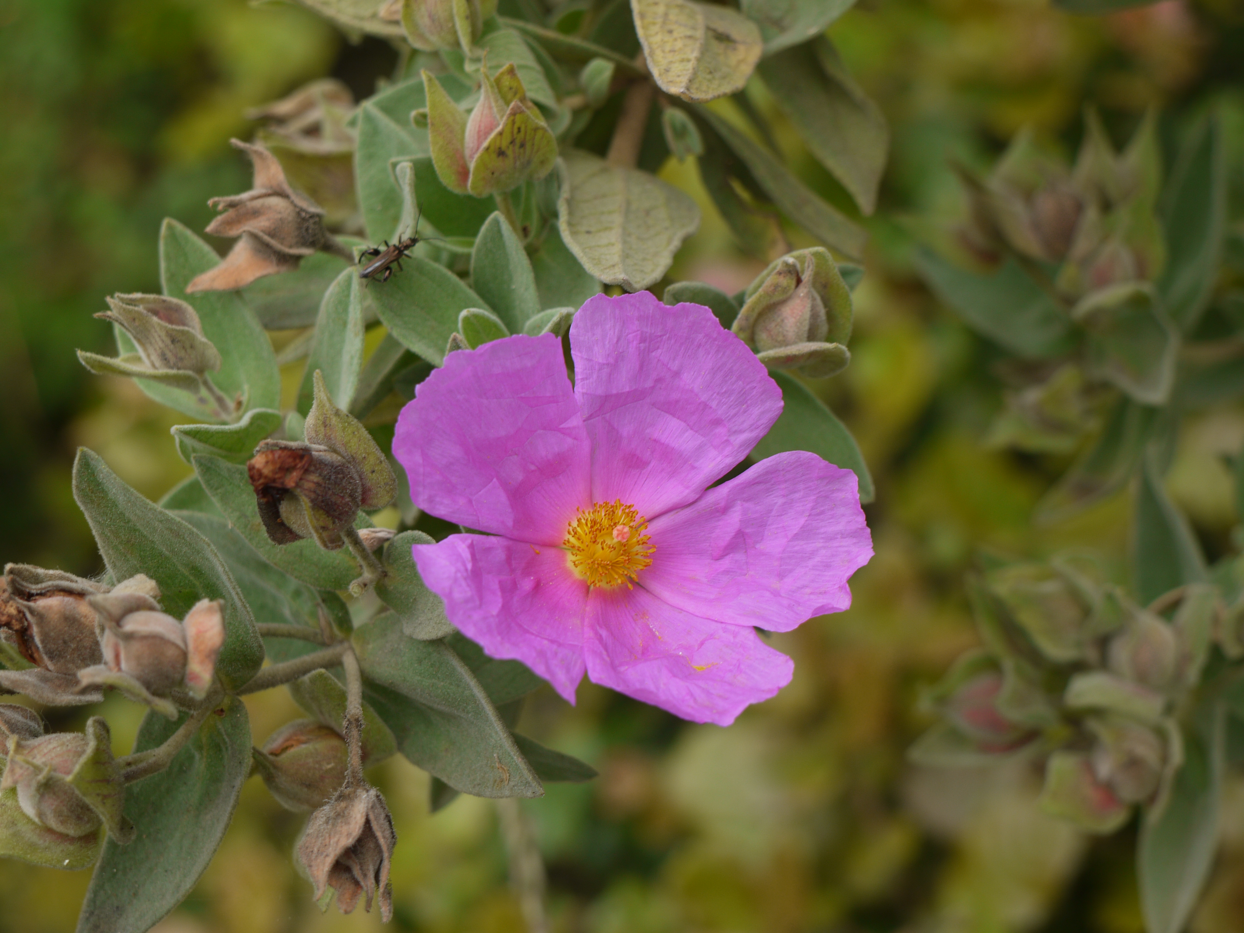 Ciste cotonneux (Cistus albidus) à Céret.